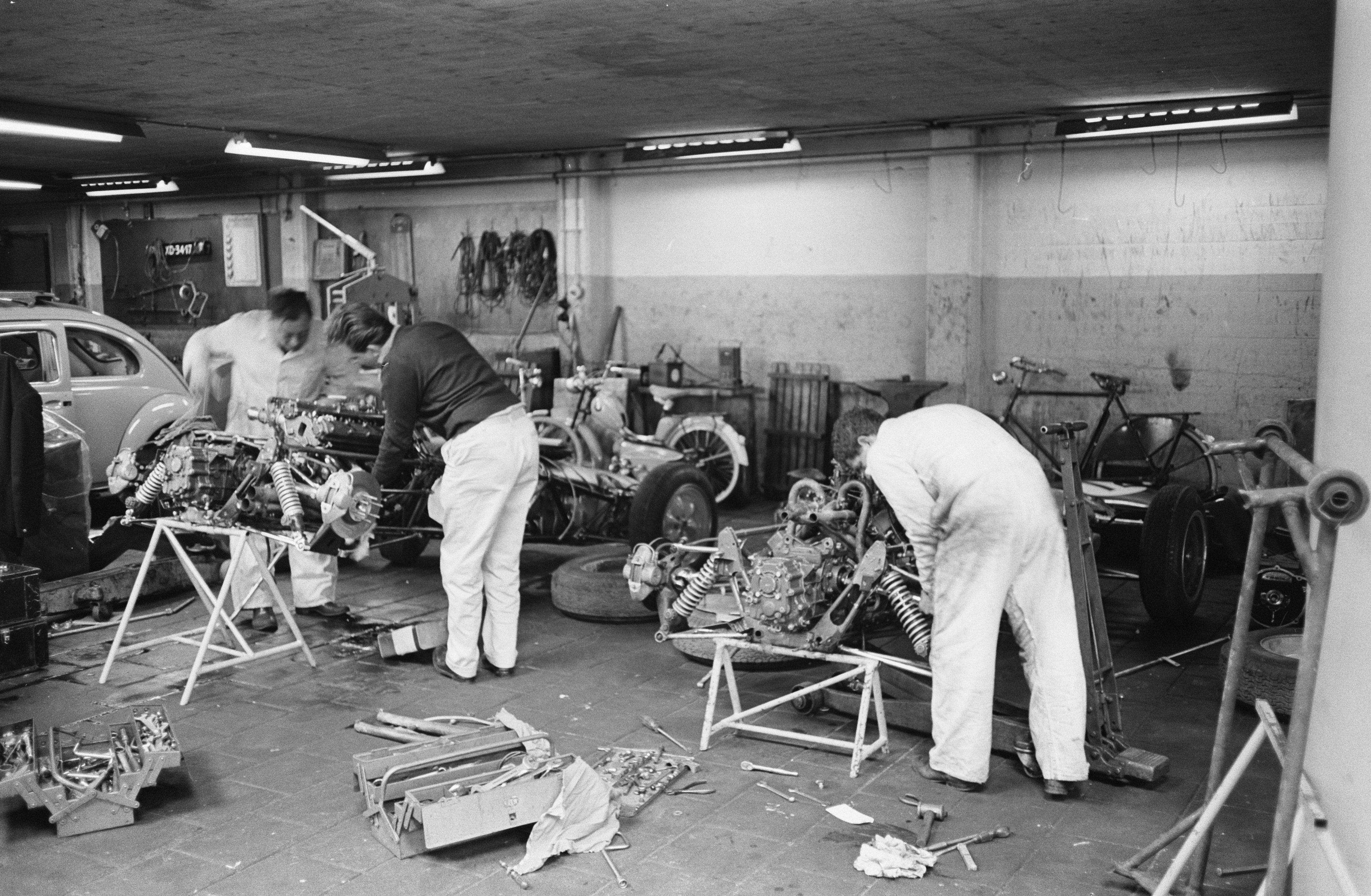 Collectie / Archief : Fotocollectie Anefo Reportage / Serie : [ onbekend ] Beschrijving : Voorbereidingen voor de aanstaande Grand Prix Datum : 16 mei 1962 Locatie : Noord-Holland, Zandvoort Trefwoorden : Voorbereidingen, monteurs Fotograaf : Pot, Harry / Anefo Auteursrechthebbende : Nationaal Archief Materiaalsoort : Negatief (zwart/wit) Nummer archiefinventaris : bekijk toegang 2.24.01.05 Bestanddeelnummer : 913-9271